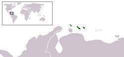 Locatie ABC-eilanden - afgeleid van nl::File:Curacao Location.png door B.E. Moeial en Vardion.